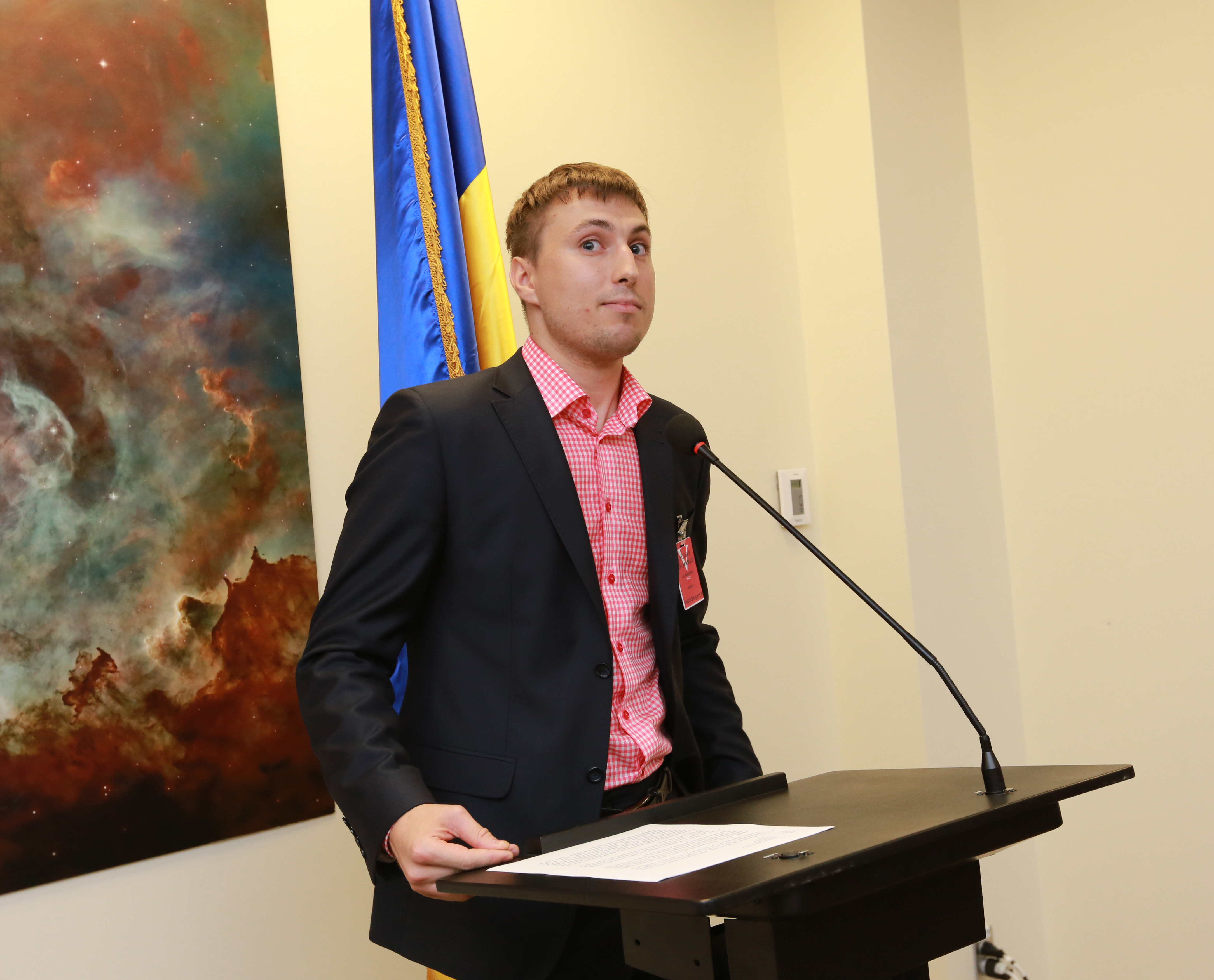 фотографія ЛГБТ активіста Богдана Глоби